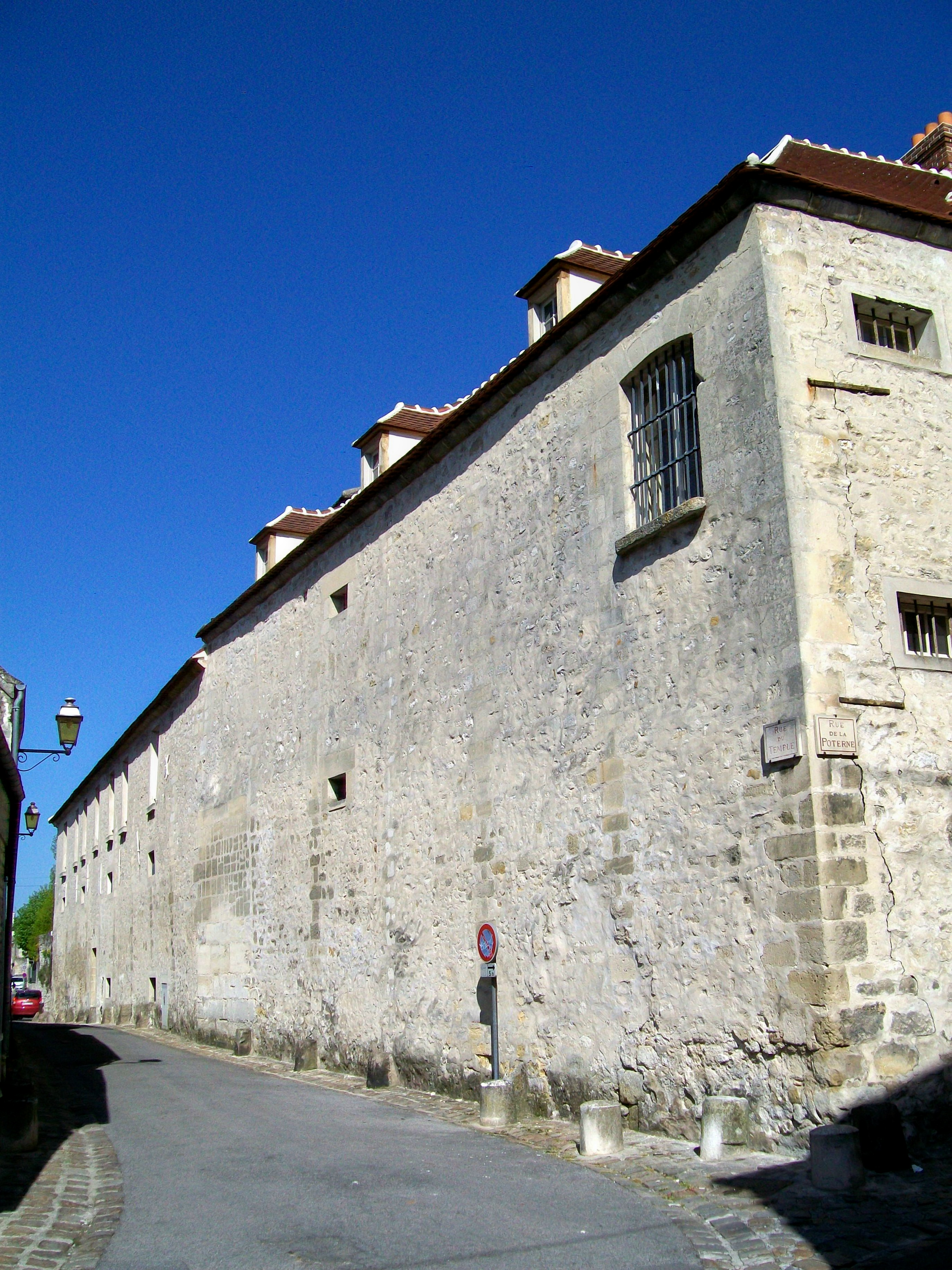 Le bâtiment de « la Force » de 1752 le long de la rue Temple, depuis le carrefour avec la rue de la Poterne.